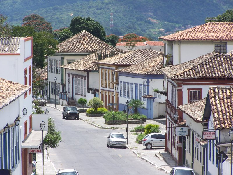 Rua Direita de Santa Luzia, Minas Gerais, Brasil.